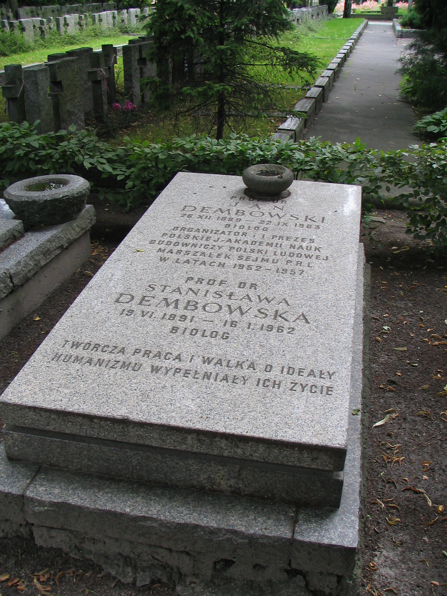 Grób Jana Dembowskiego